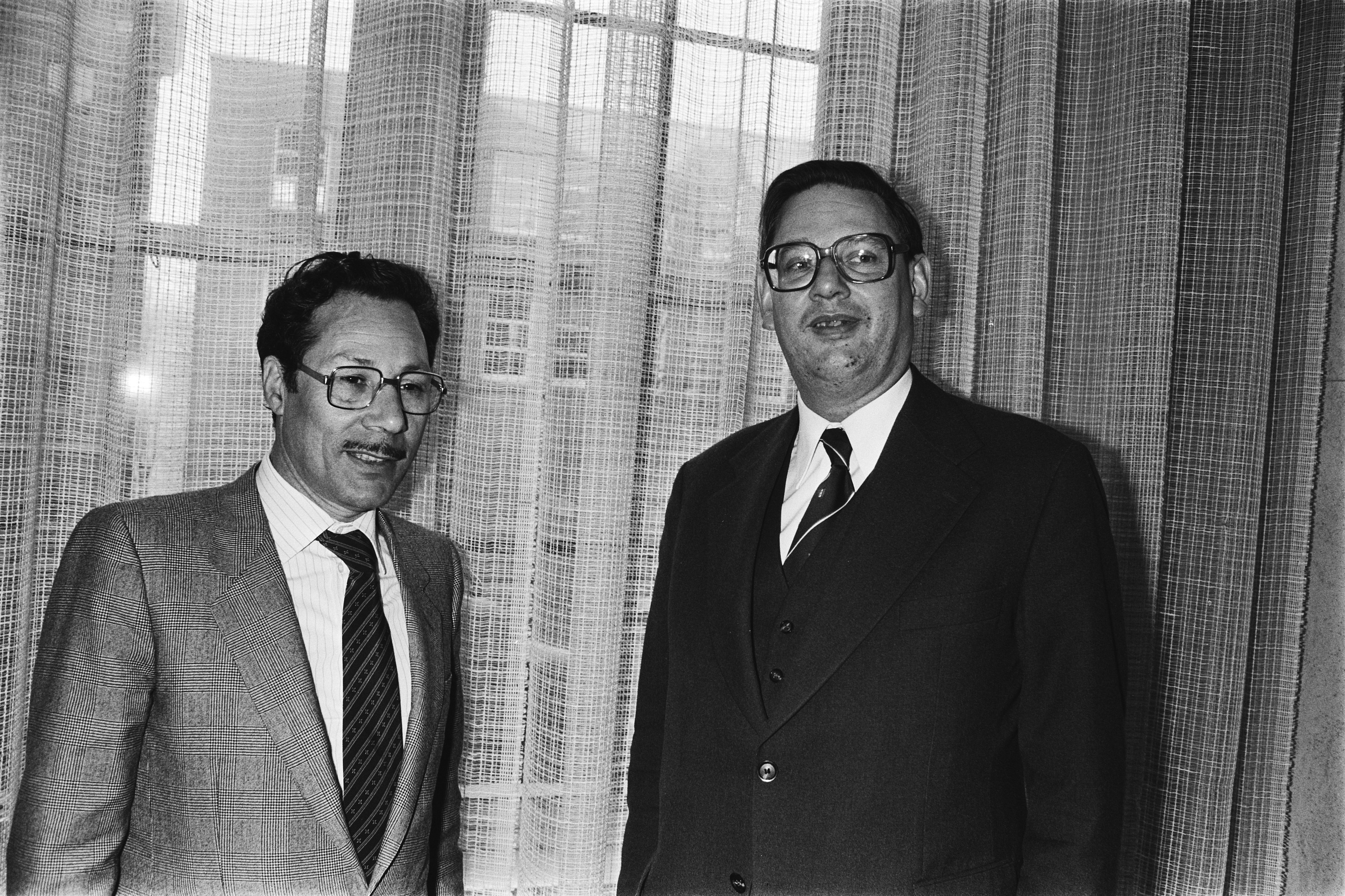 Collectie / Archief : Fotocollectie Anefo Reportage / Serie : [ onbekend ] Beschrijving : Gesprek tussen van Aardenne (rechts) en Algerijnse minister van Energie Belkacen Nabi Datum : 19 februari 1980 Trefwoorden : ministers Persoonsnaam : Aardenne, Gijs van Fotograaf : Suyk, Koen / Anefo Auteursrechthebbende : Nationaal Archief Materiaalsoort : Negatief (zwart/wit) Nummer archiefinventaris : bekijk toegang 2.24.01.05 Bestanddeelnummer : 930-6773